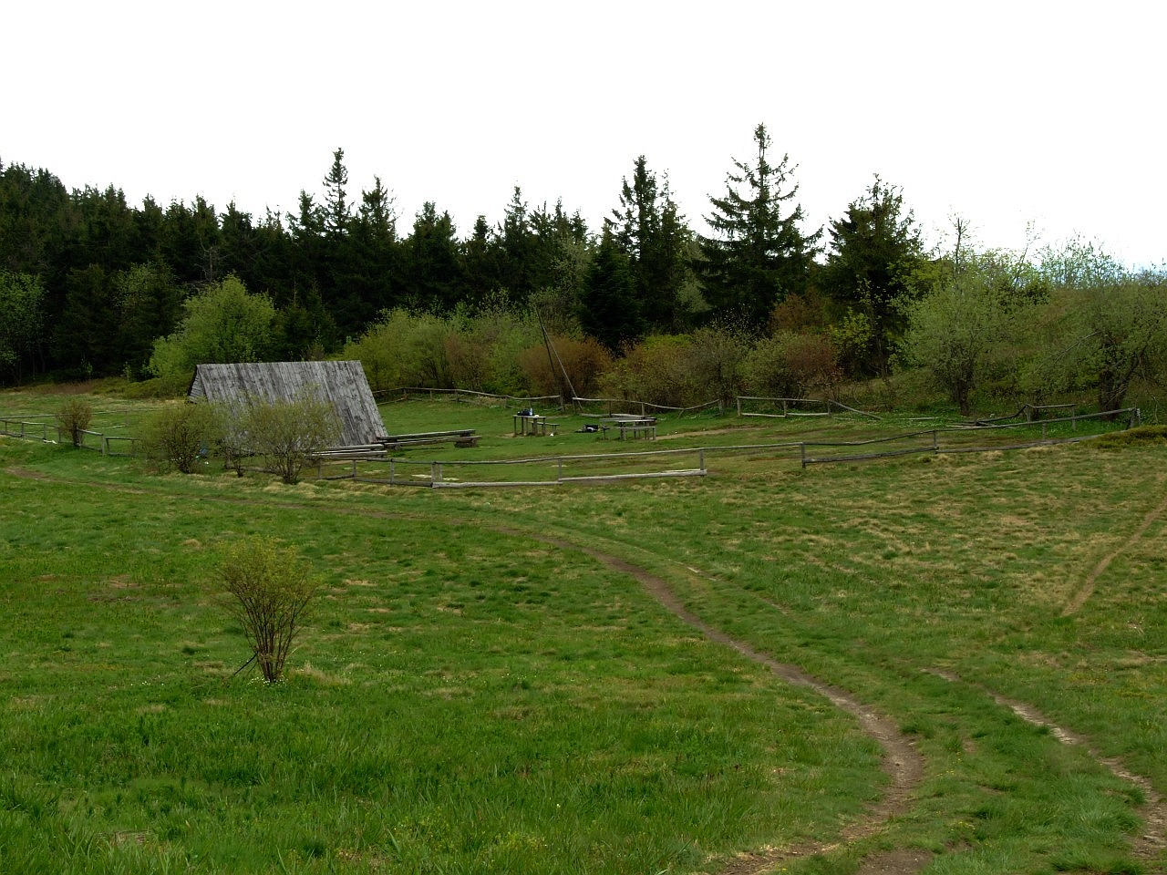 Polana Wierch Lubania w Gorcach i studencka baza namiotowa (przed sezonem)